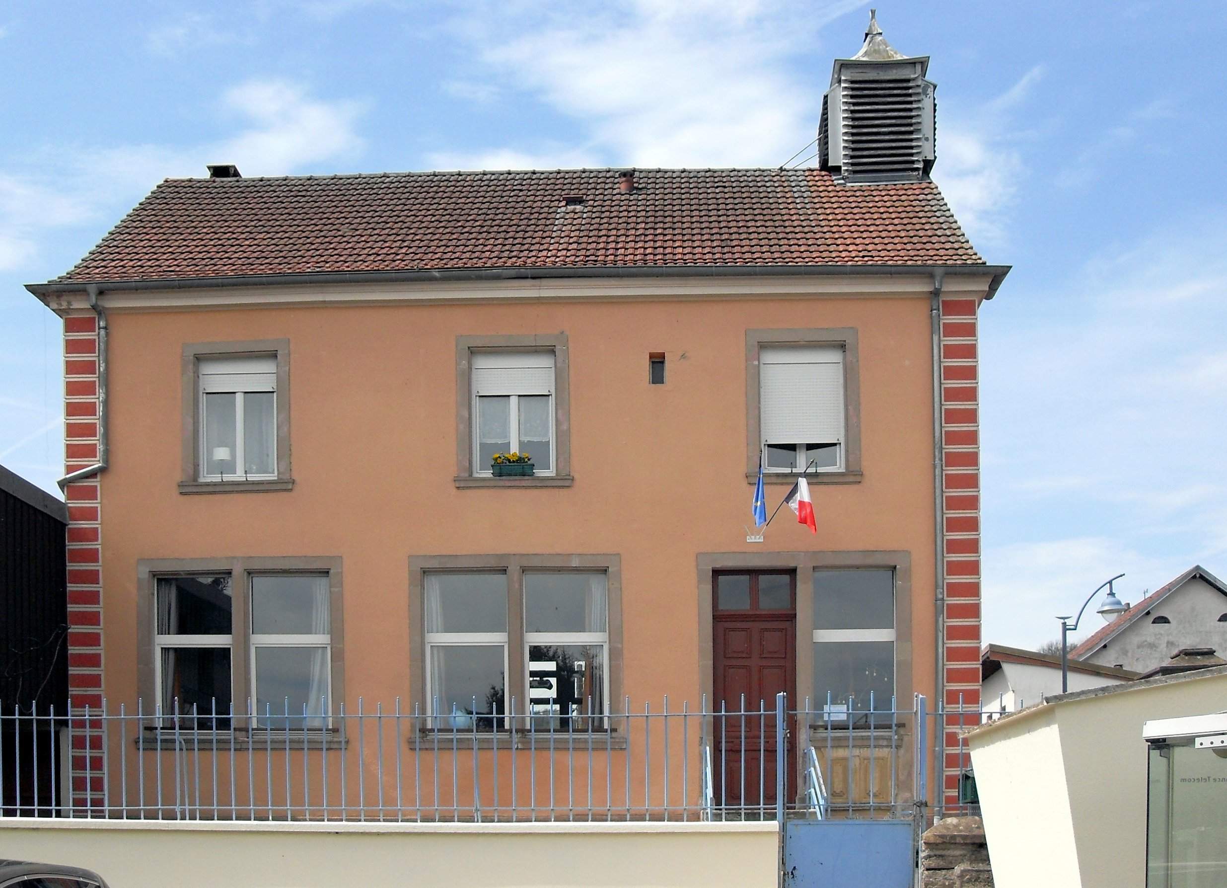 La mairie d'Urcerey